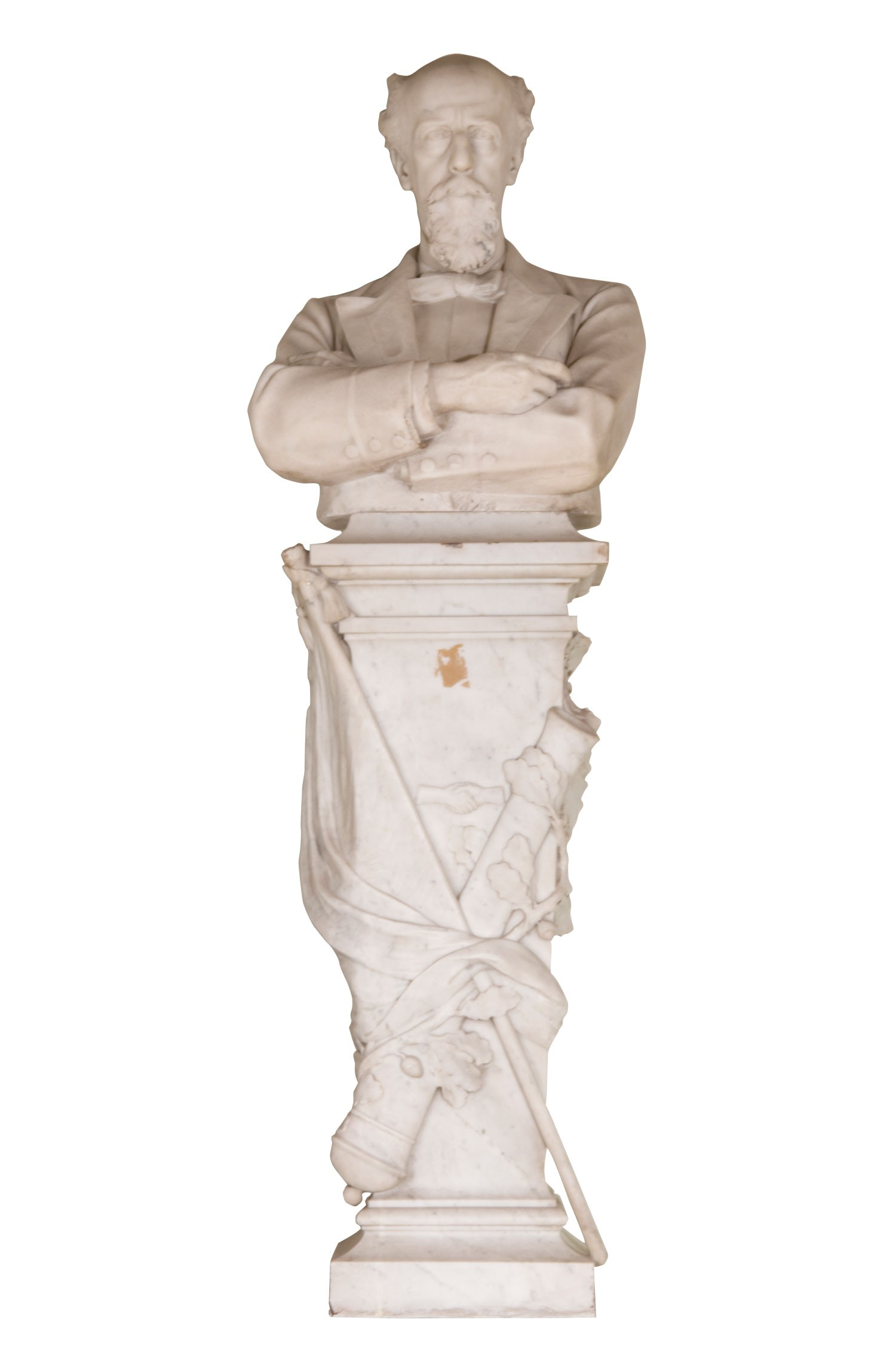 Ettore Ximenes, Retrato del General Roca. 1902. 74 x 59 cm, talla en mármol. Inv. 6565.